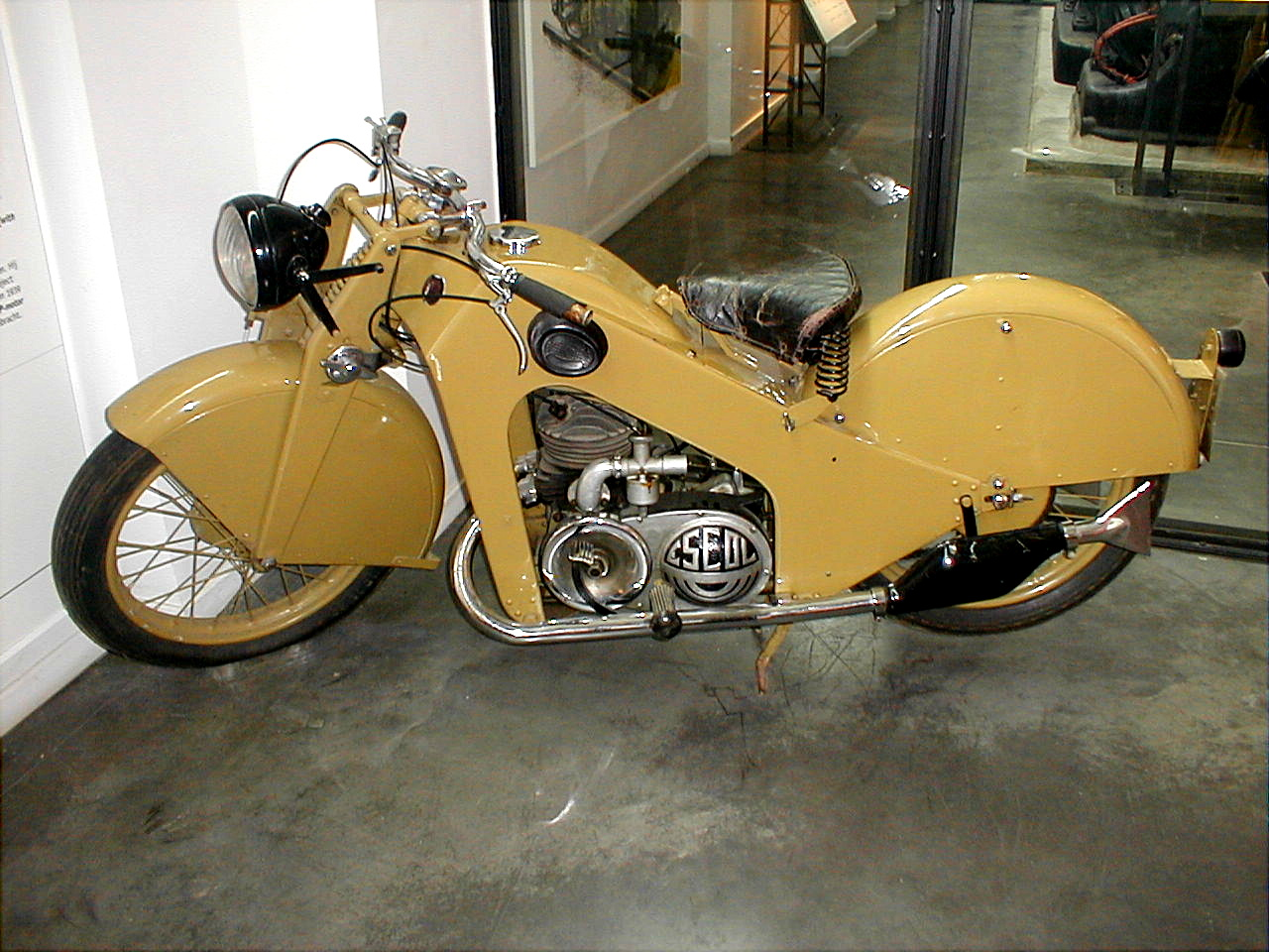 Motocyclette belge Escol se trouvant dans la salle d'exposition du Bois du Cazier à Marcinelle.